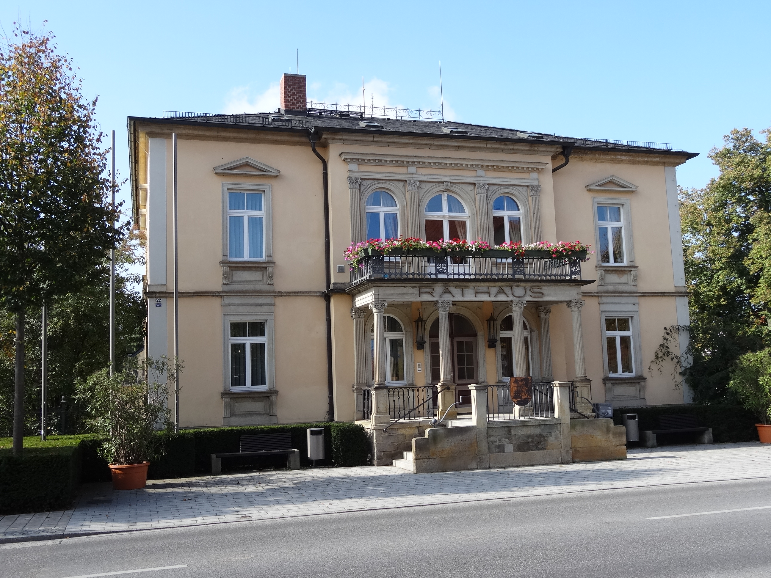 Rathaus Moritzburg